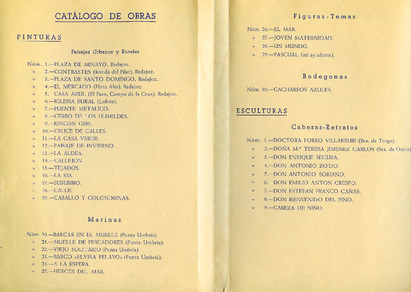 Díptico de la "Exposición de Pinturas y Esculturas: G. Silveira García-Galán". Casa de la Cultura de la Diputación Provincial. Badajoz, mayo de 1963. pp. 2-3. Guillermo Silveira García (1922–1987) Description painter and sculptorDate of birth/death 11 January 1922 11 May 1987Location of birth/death Segura de León BadajozWork periodcirca 1945-1987Work location Badajoz (1954–)Authority control : Q5888937 ISNI: 0000 0000 7827 0108